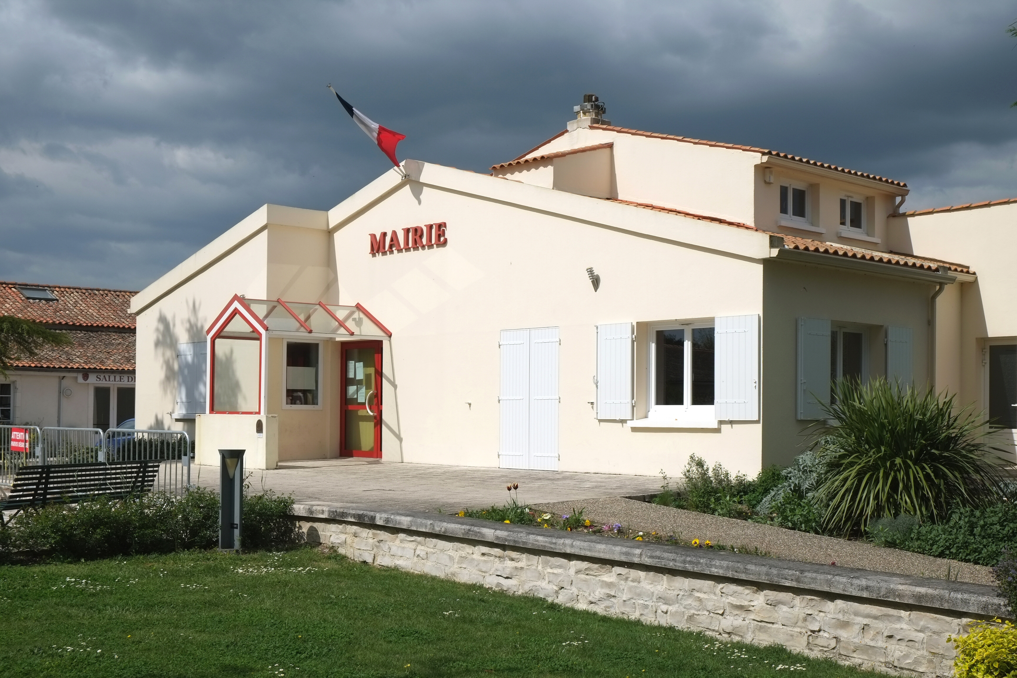 Mairie Vérines Charente-Maritime France